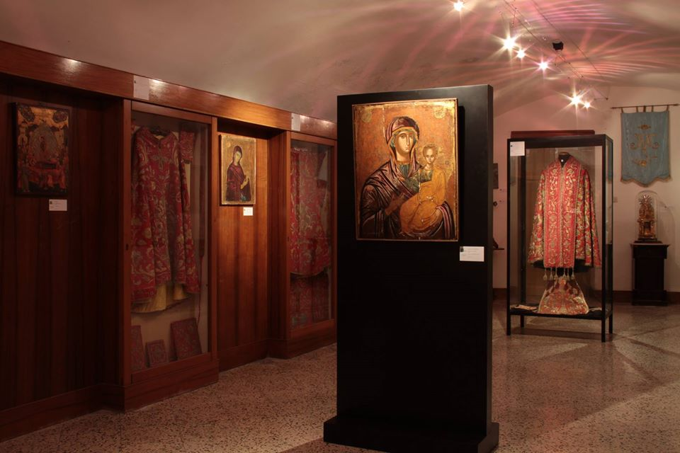 Museo del Collegio di Maria, Piana degli Albanesi (PA).